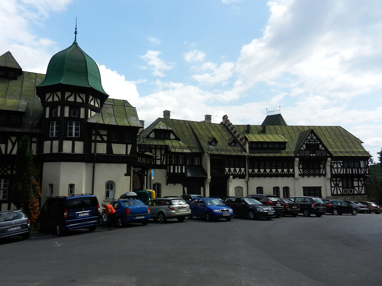 Hotel „Furnica”